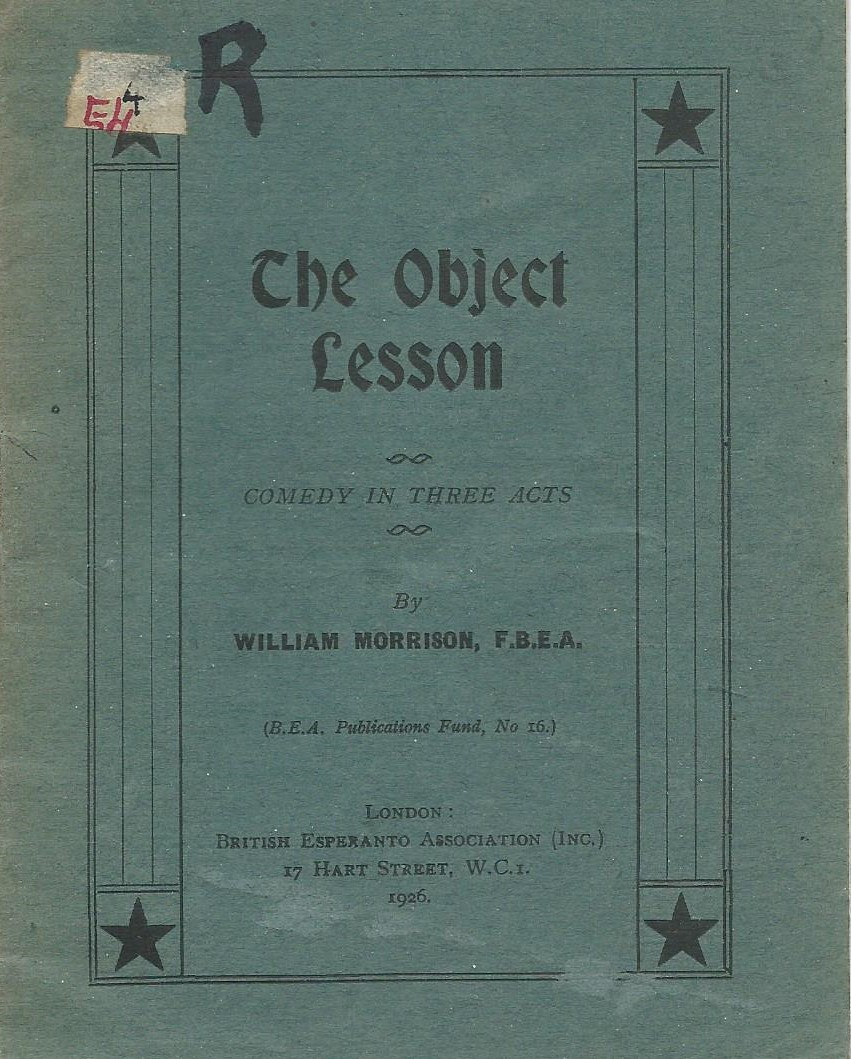 librokovrilo de "The Object Lesson", 1926